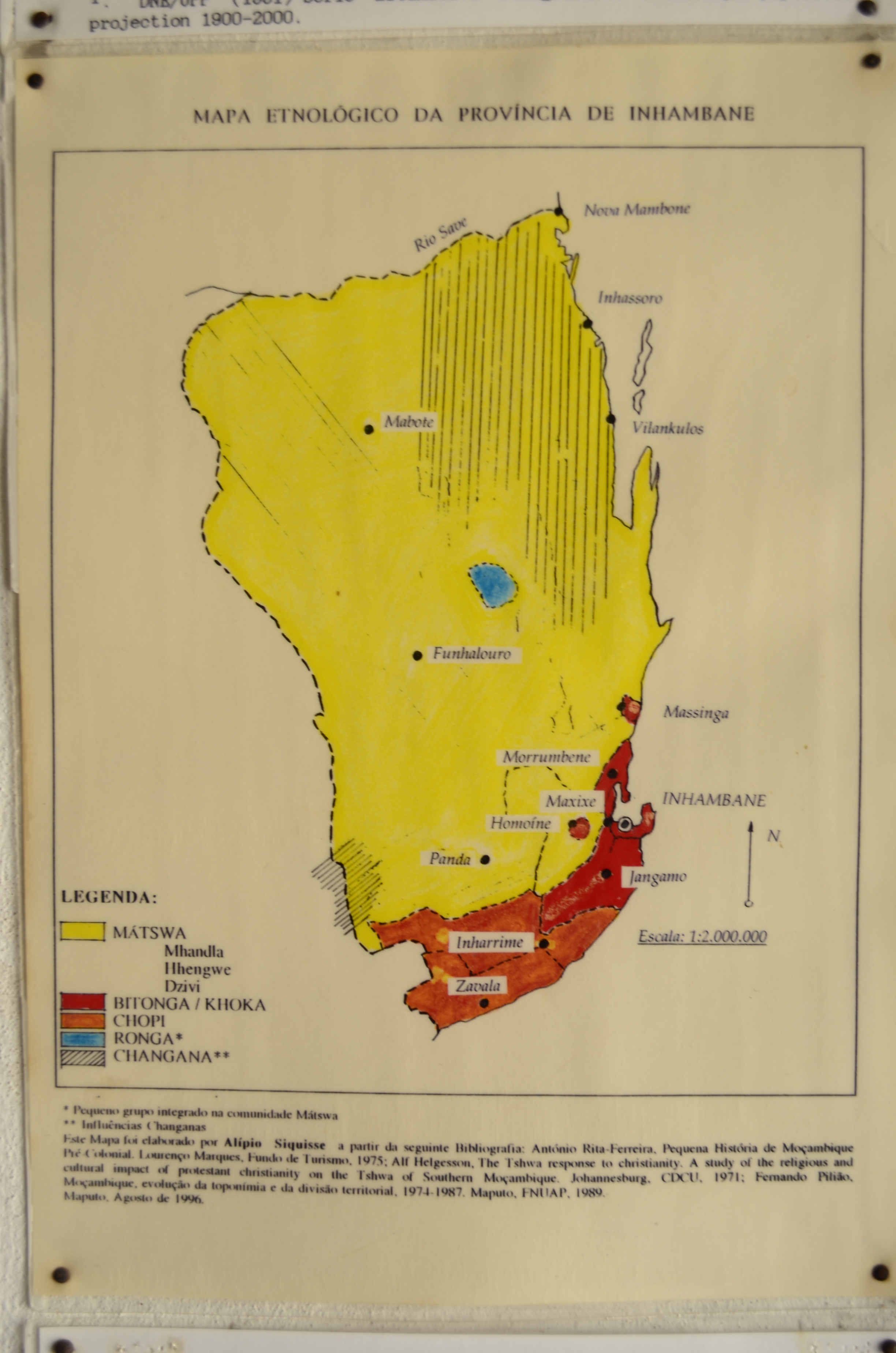 Mapa etnológico da província de Inhambane